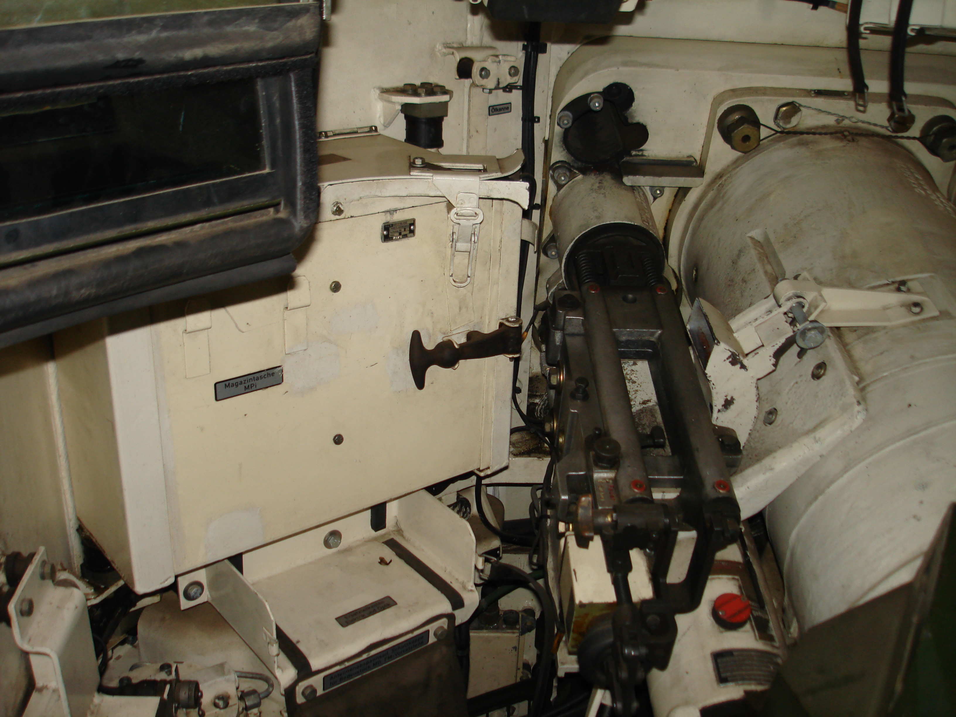 Oberer Bereich am Ladeschützenplatz im Leopard 2A4. Zu sehen ist unter anderm die Halterung für das Blenden-MG sowie rechts davon ein Teil der 120 mm Bordkanone L/44.